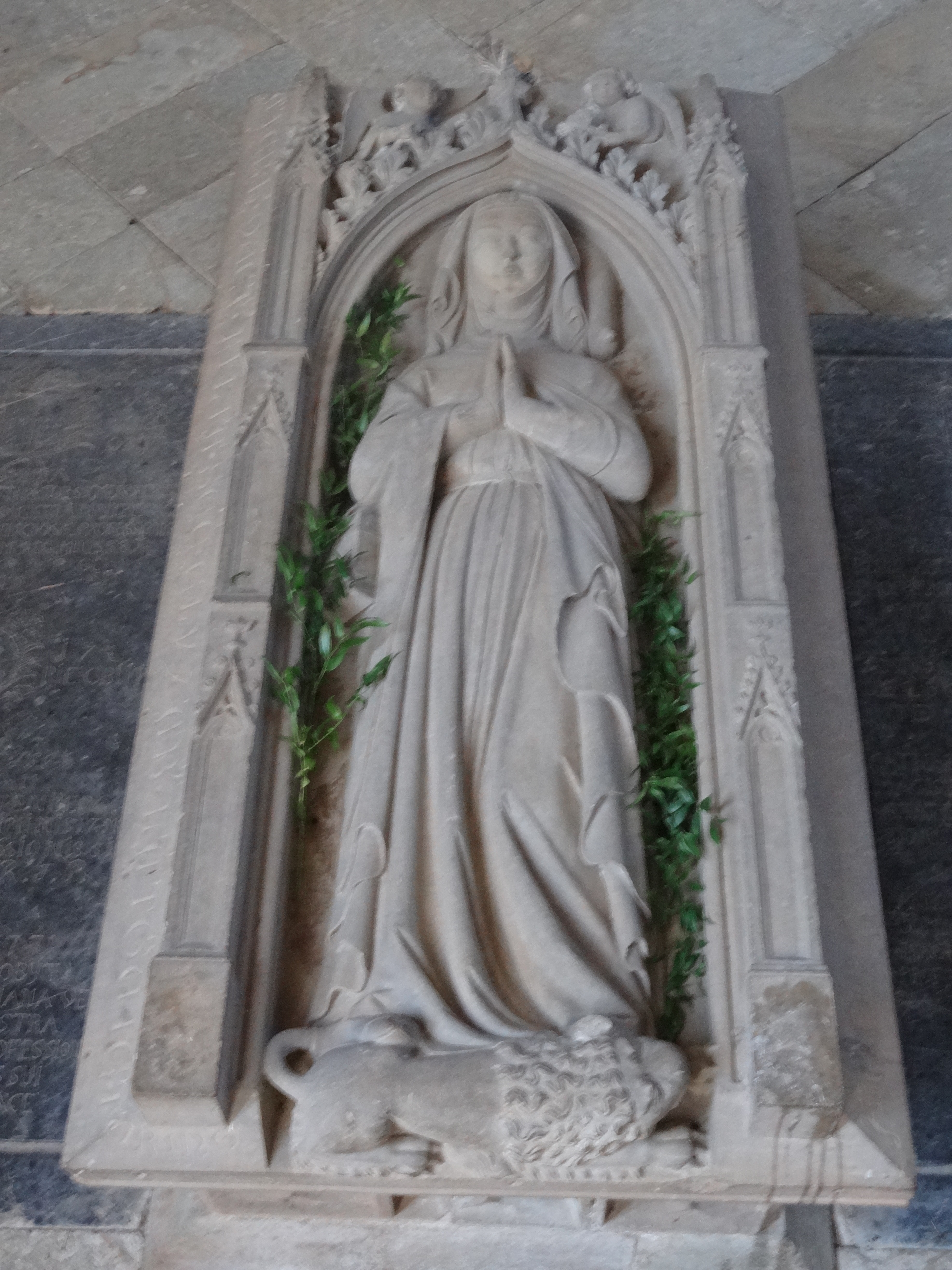 Kloster Altenberg (Solms)